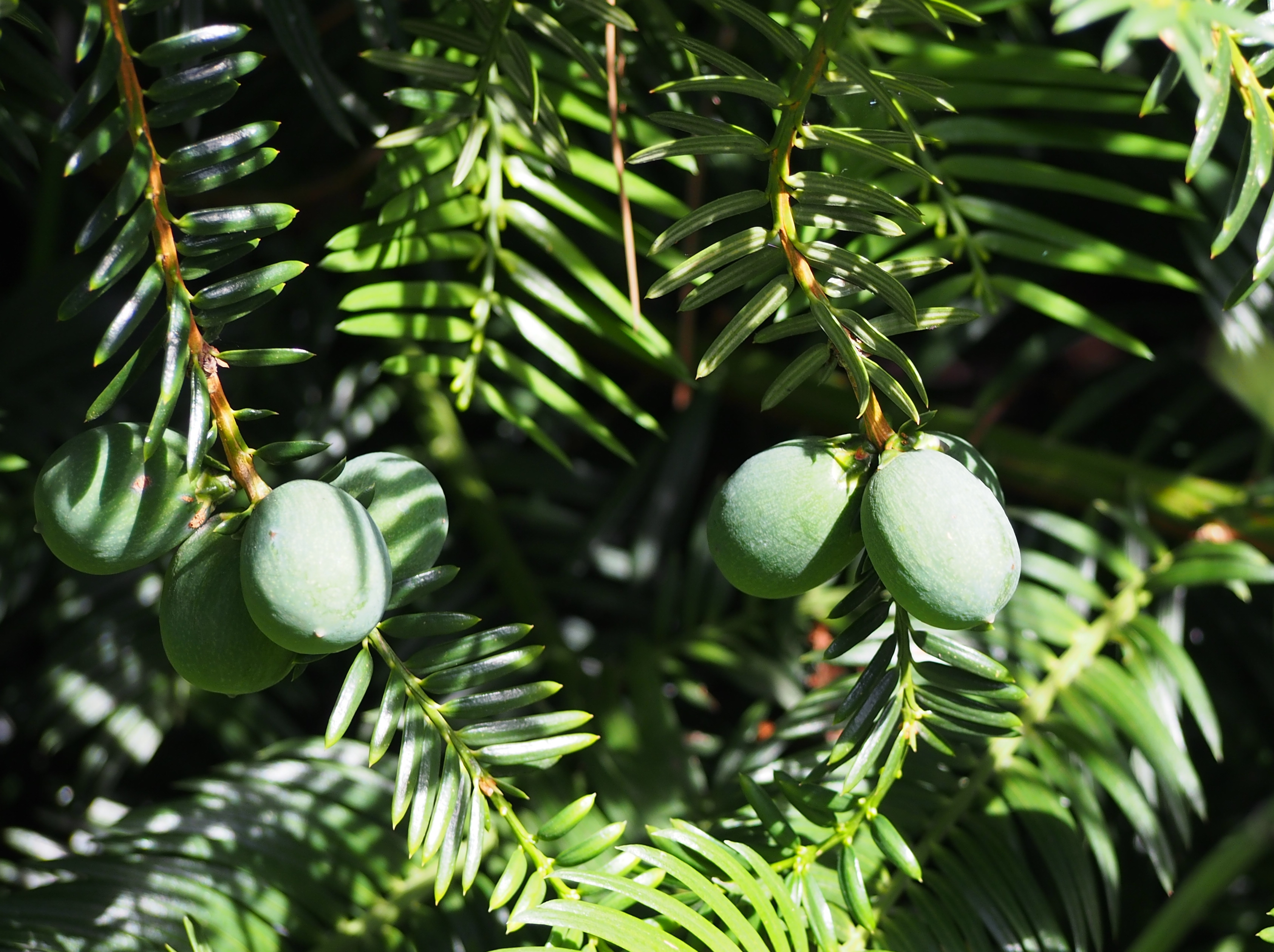 Torreja Torreya grandis, okaz uprawiany, Ogród Botaniczny UWr, Wrocław, Polska.